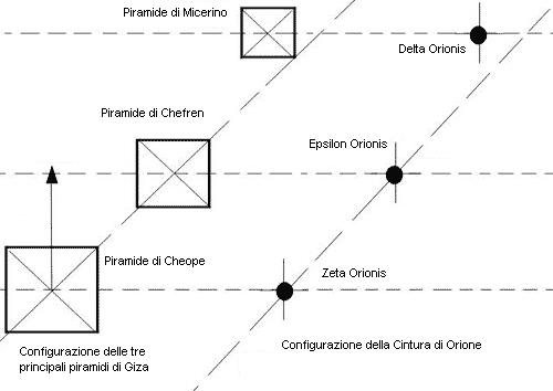 Disegno della "cintura" della costellazione di Orione e le tre principali piramidi della piana di Giza